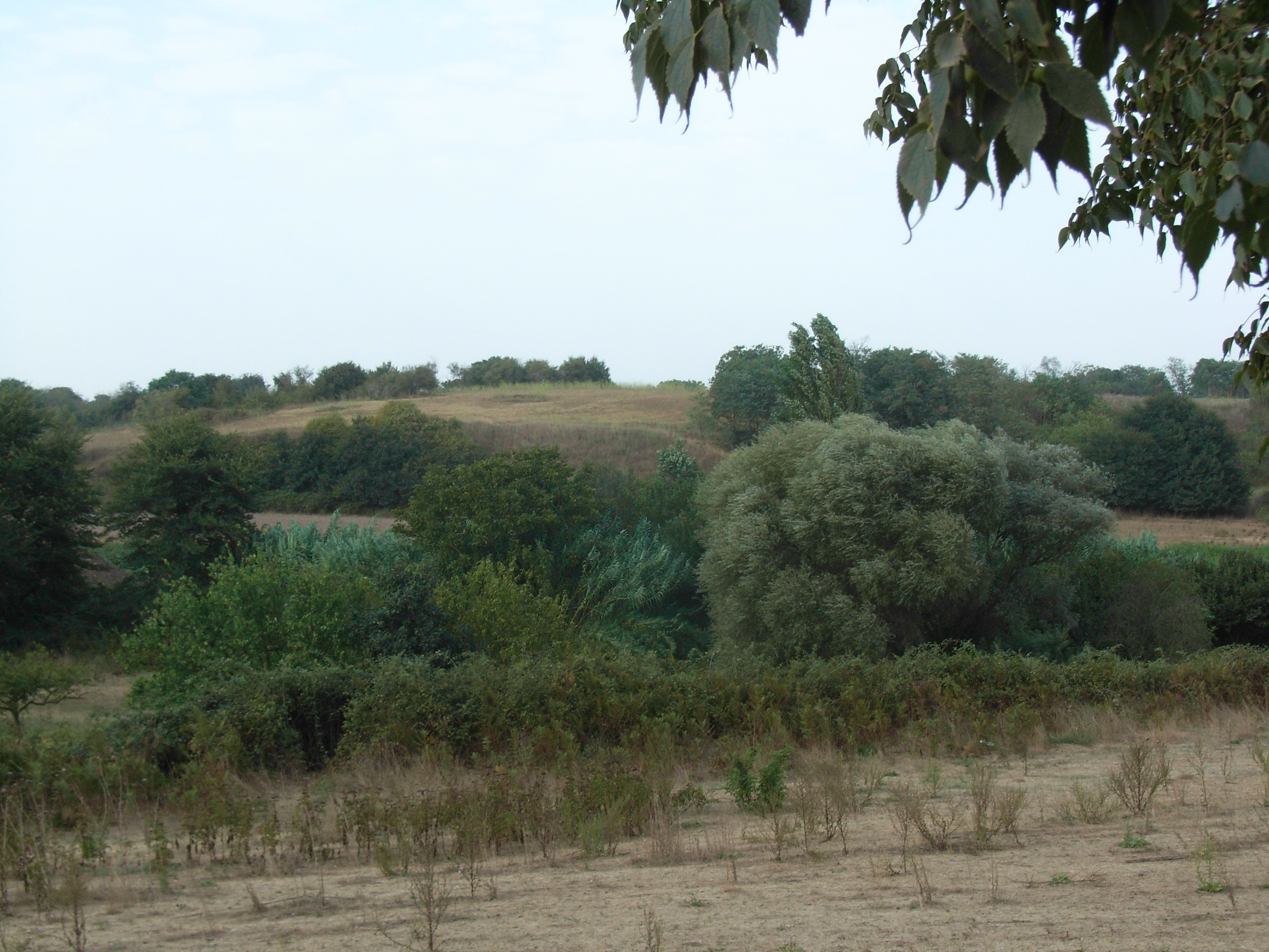 Willows in Parco della Caffarella (Rome)